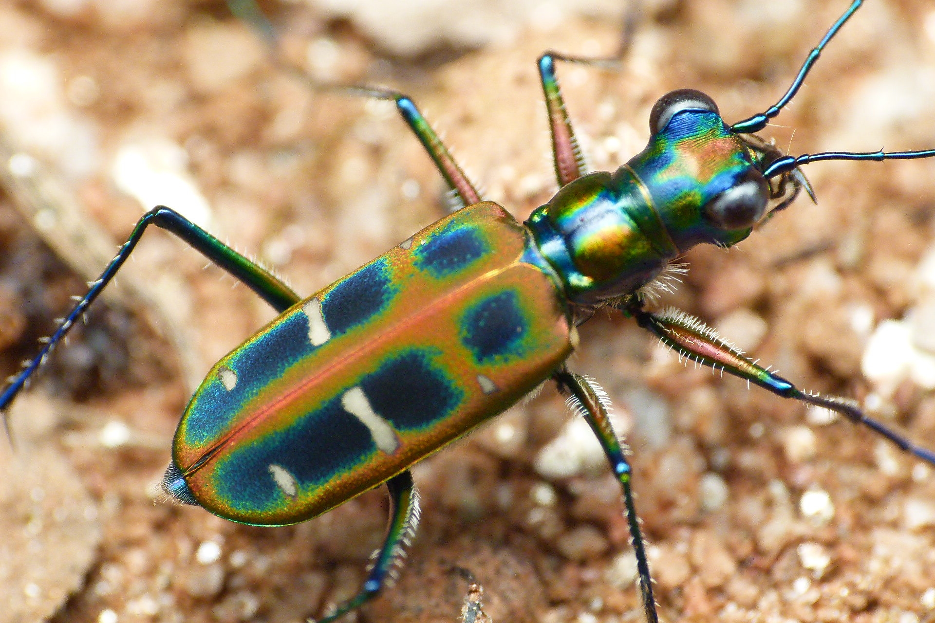 Cicindela duponti. Western Ghats, Karnataka